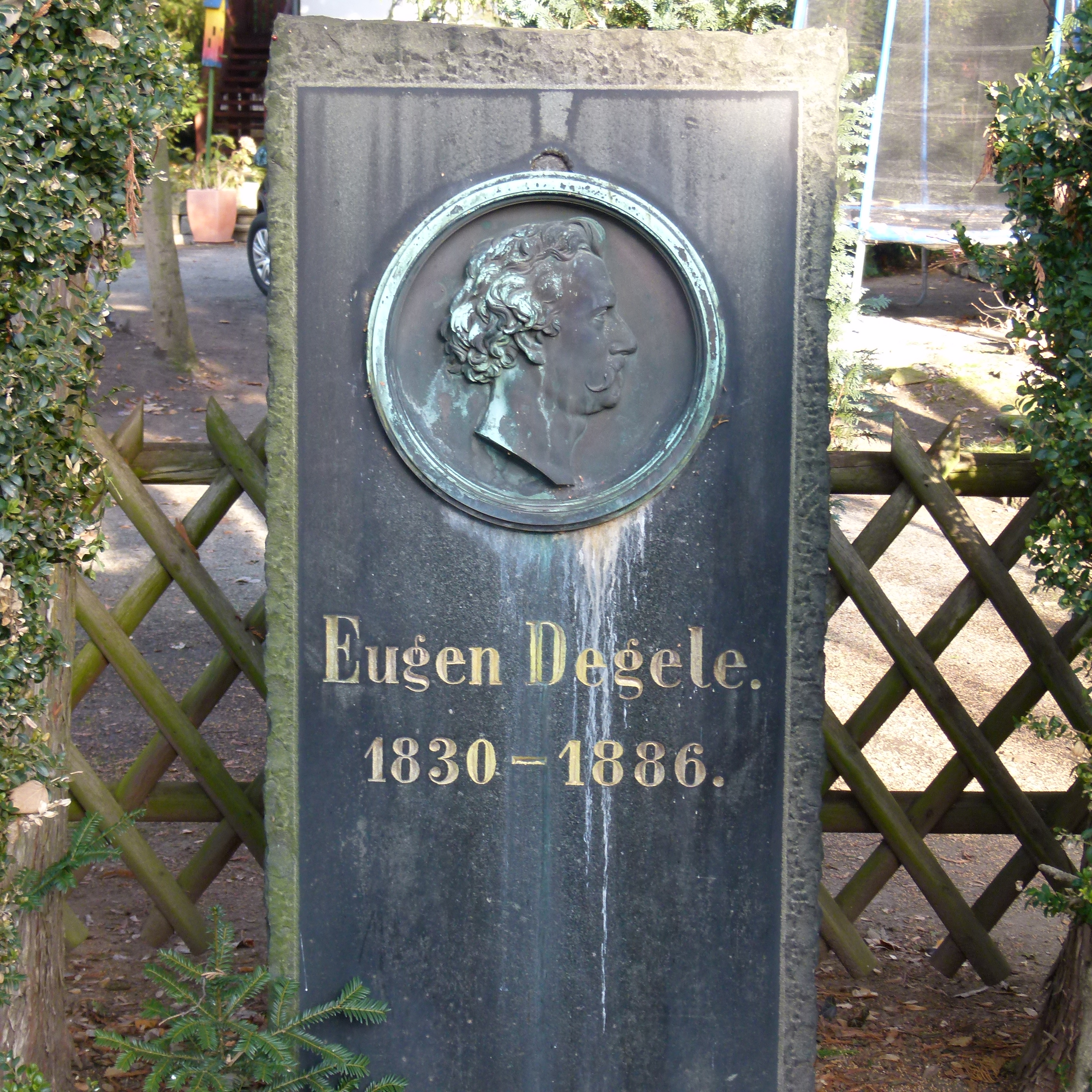 Eugen Degele-Denkmal, Degelestraße, Loschwitz, Dresden